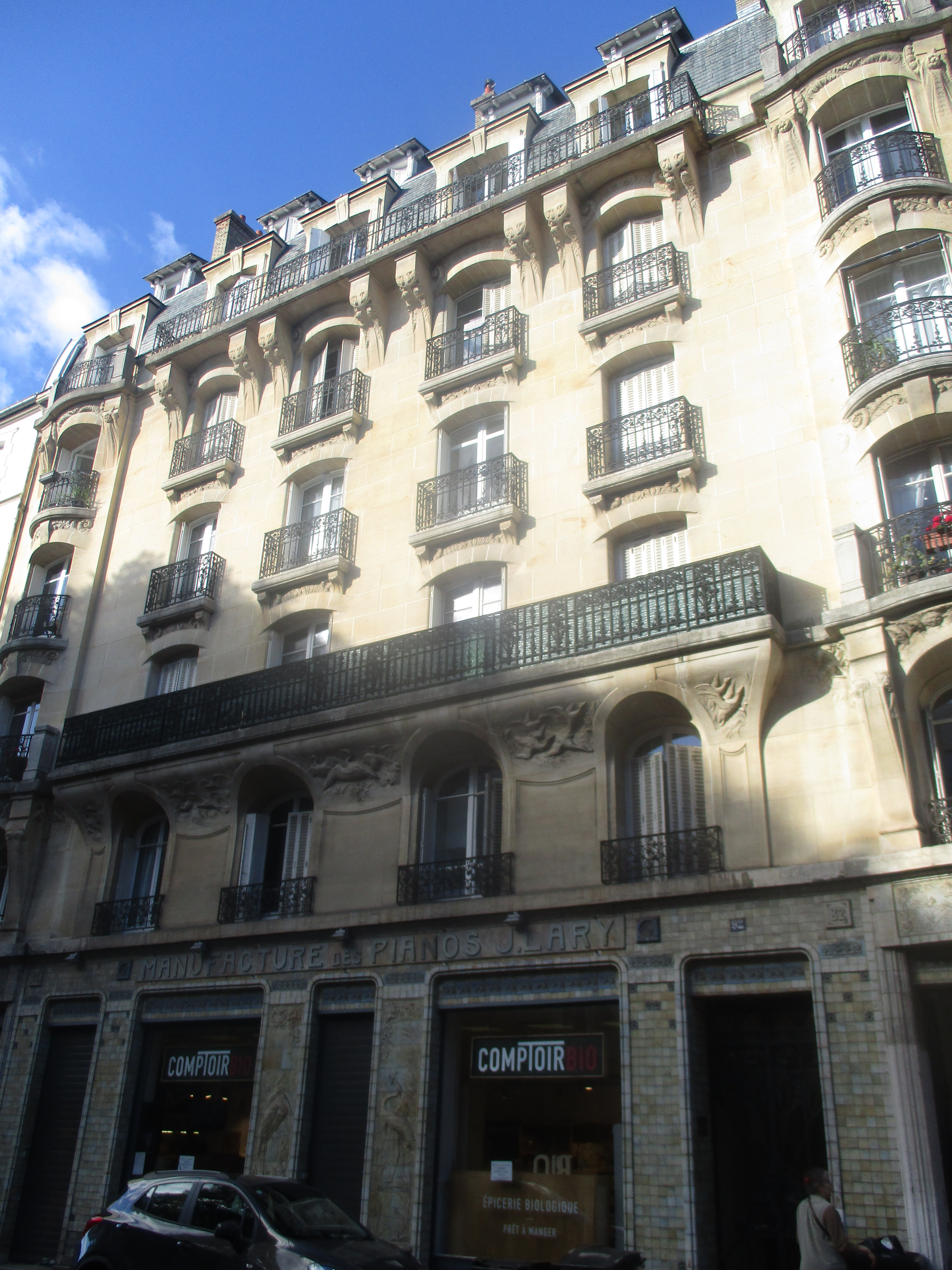 92 rue Anatole-France à Levallois-Perret.